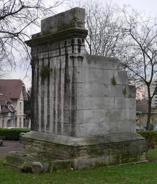 Mausolée du sévir Turpion à Lyon (France)